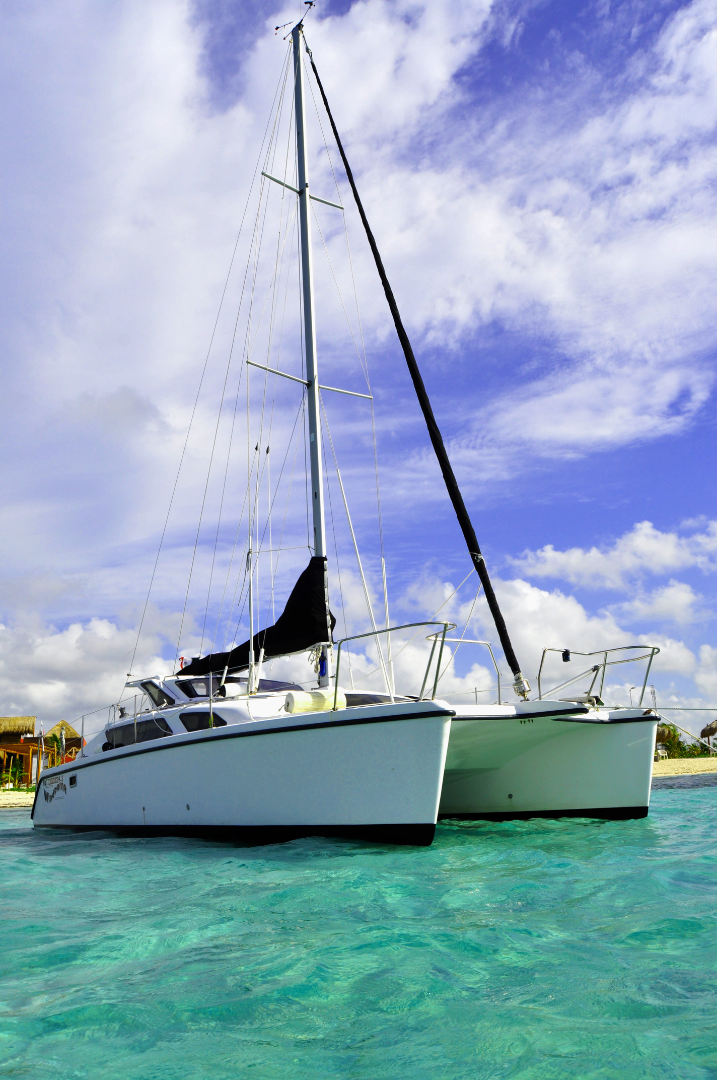 At Blue Kay Beach en la Costa Maya (